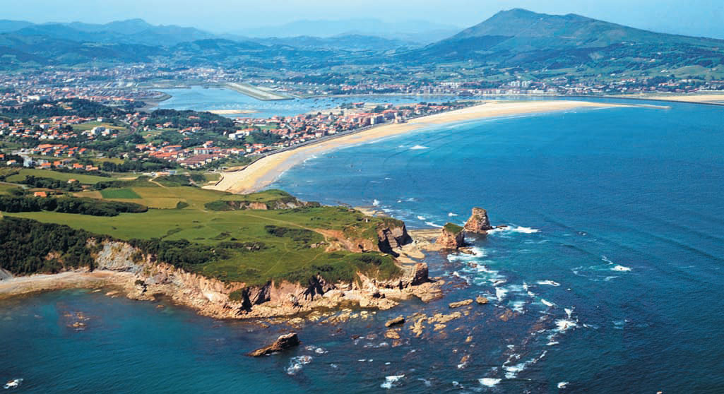 Hendaiaren ikuspegia